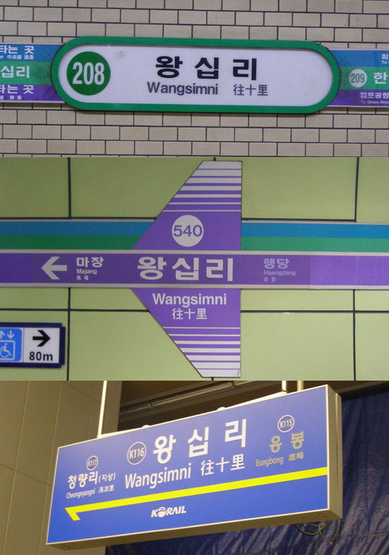 왕십리역 역명판